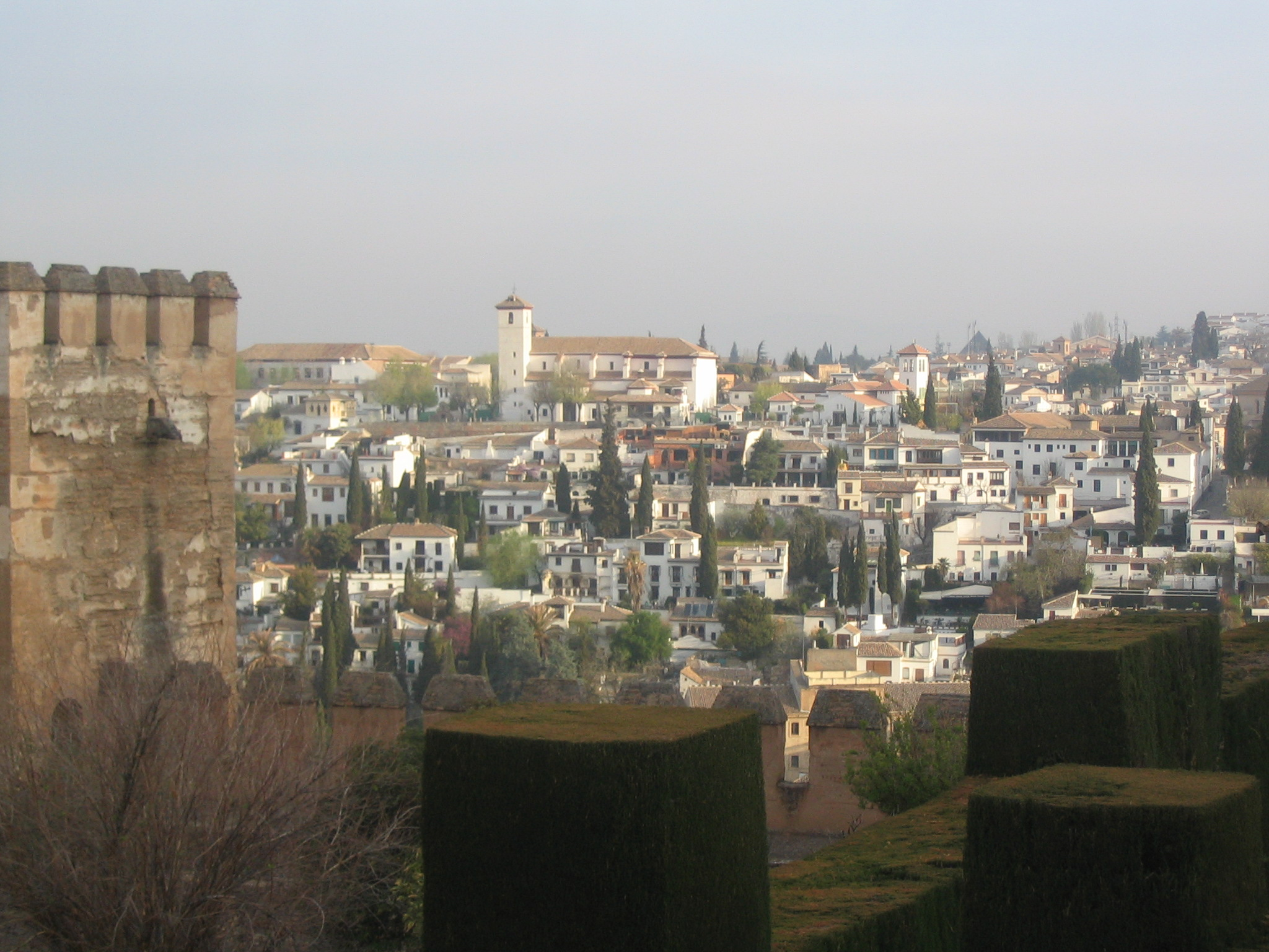 Grenade quartier de l'Albaicin(Espagne)